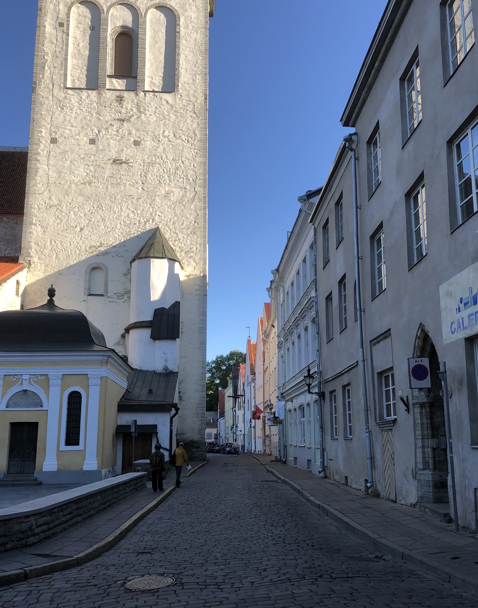 Ritterstraße 2018, Blick von Norden